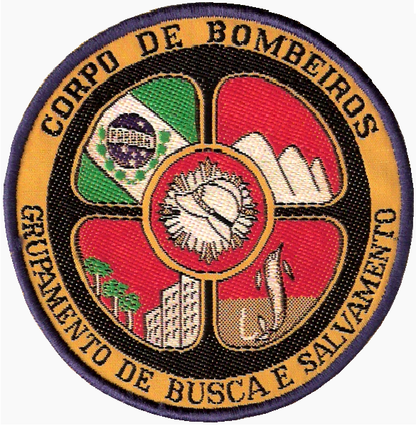 Brasão do extinto GBS (Grupamento de Busca e Salvamento) do Corpo de Bombeiros do Paraná.